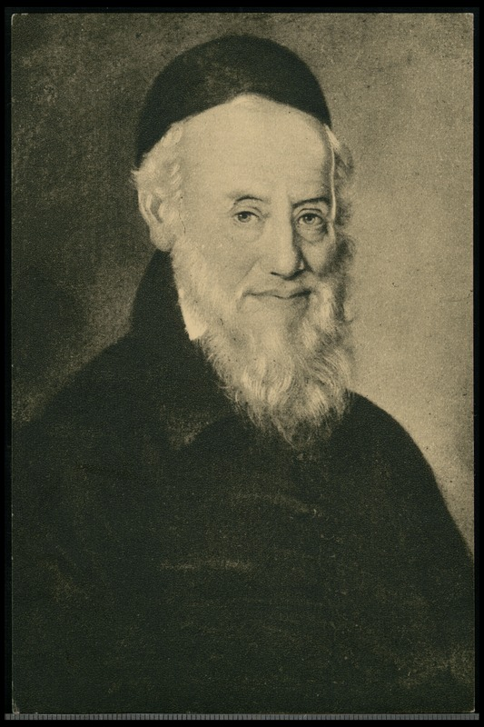 רבי אהרן חורין